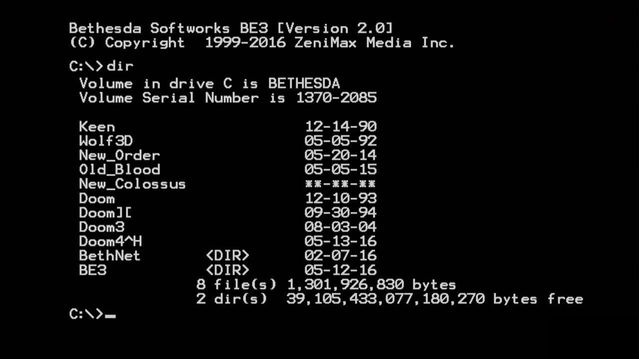 Тизер-изображение компьютерной игры Wolfenstein II: The New Colossus с выставки E3 2016